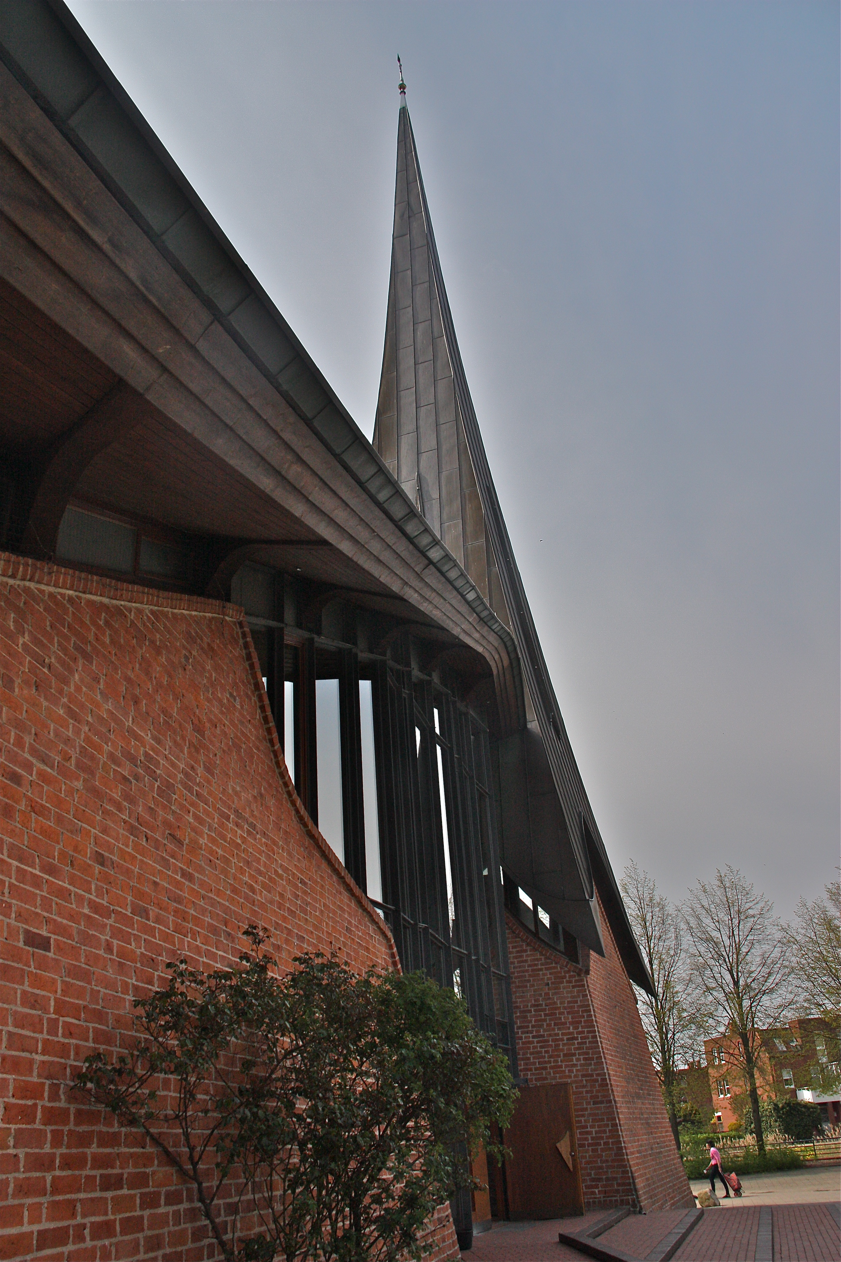 Hamburg, Neuallermöhe, Franz-von-Assisi-Kirche, Dachüberstand der Eingangsseite